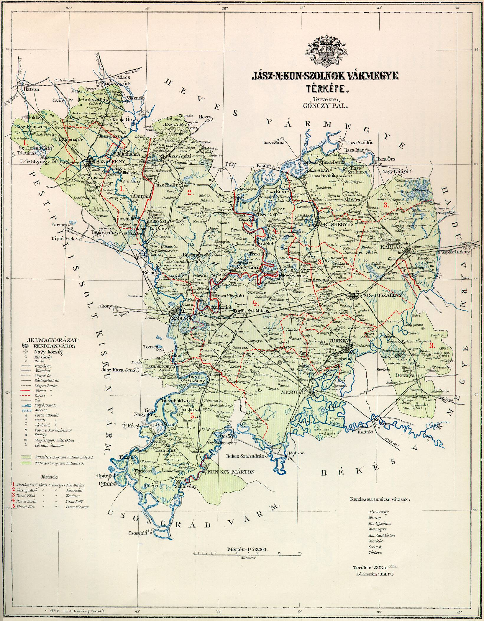 Map of Jász-Nagykun-Szolnok county in the Kingdom of Hungary